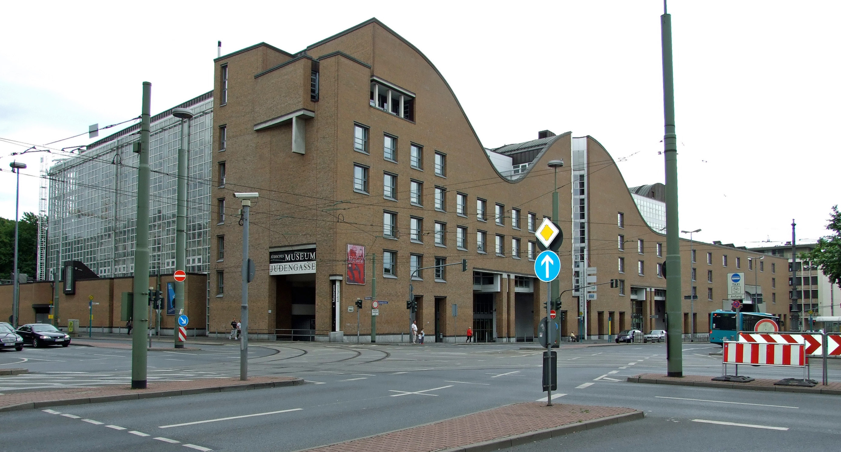 Museum Judengasse (Zweigstelle des Jüdischen Museums) in Ffm